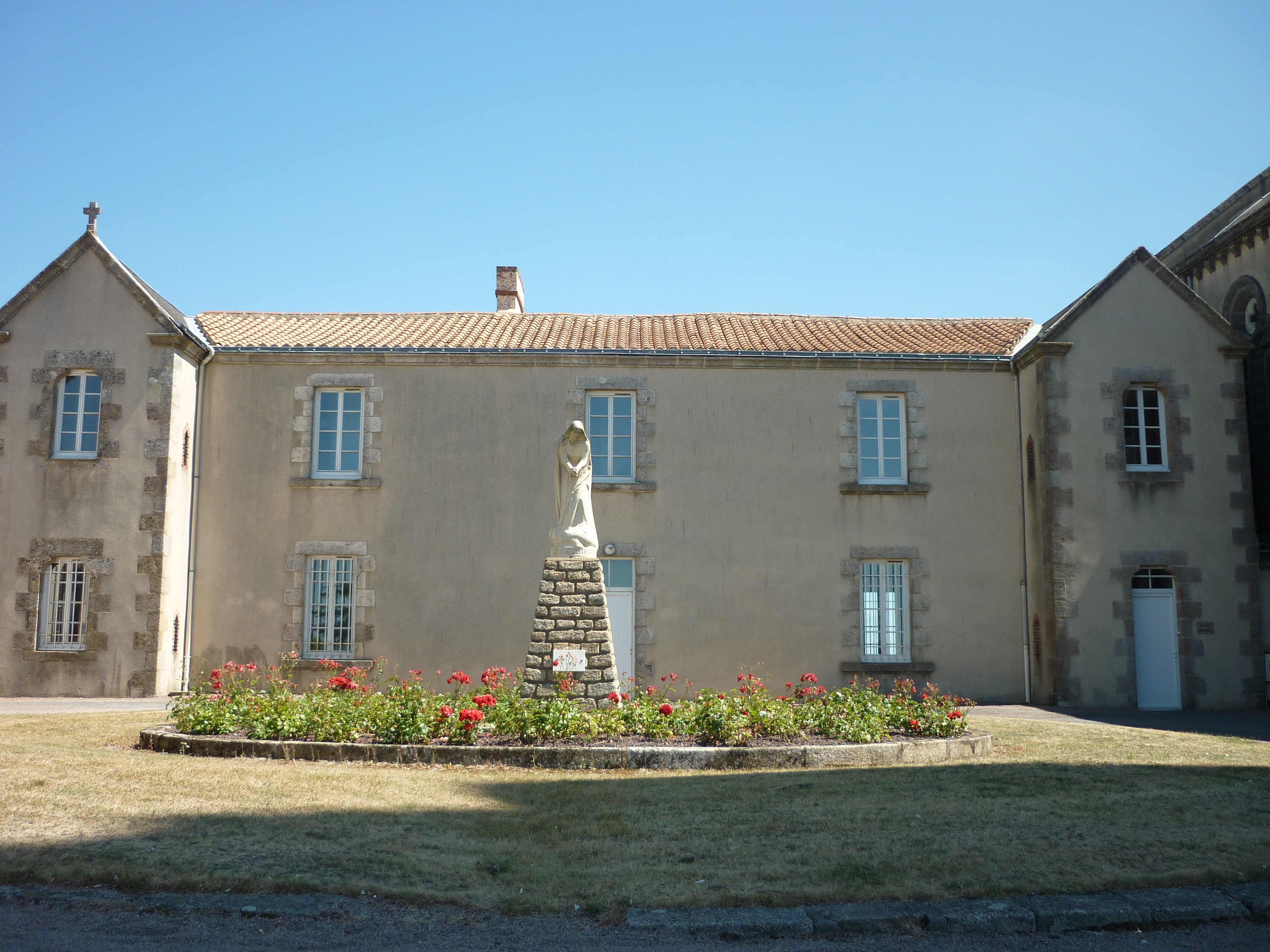 presbytère de Saint-Michel-Mont-Mercure